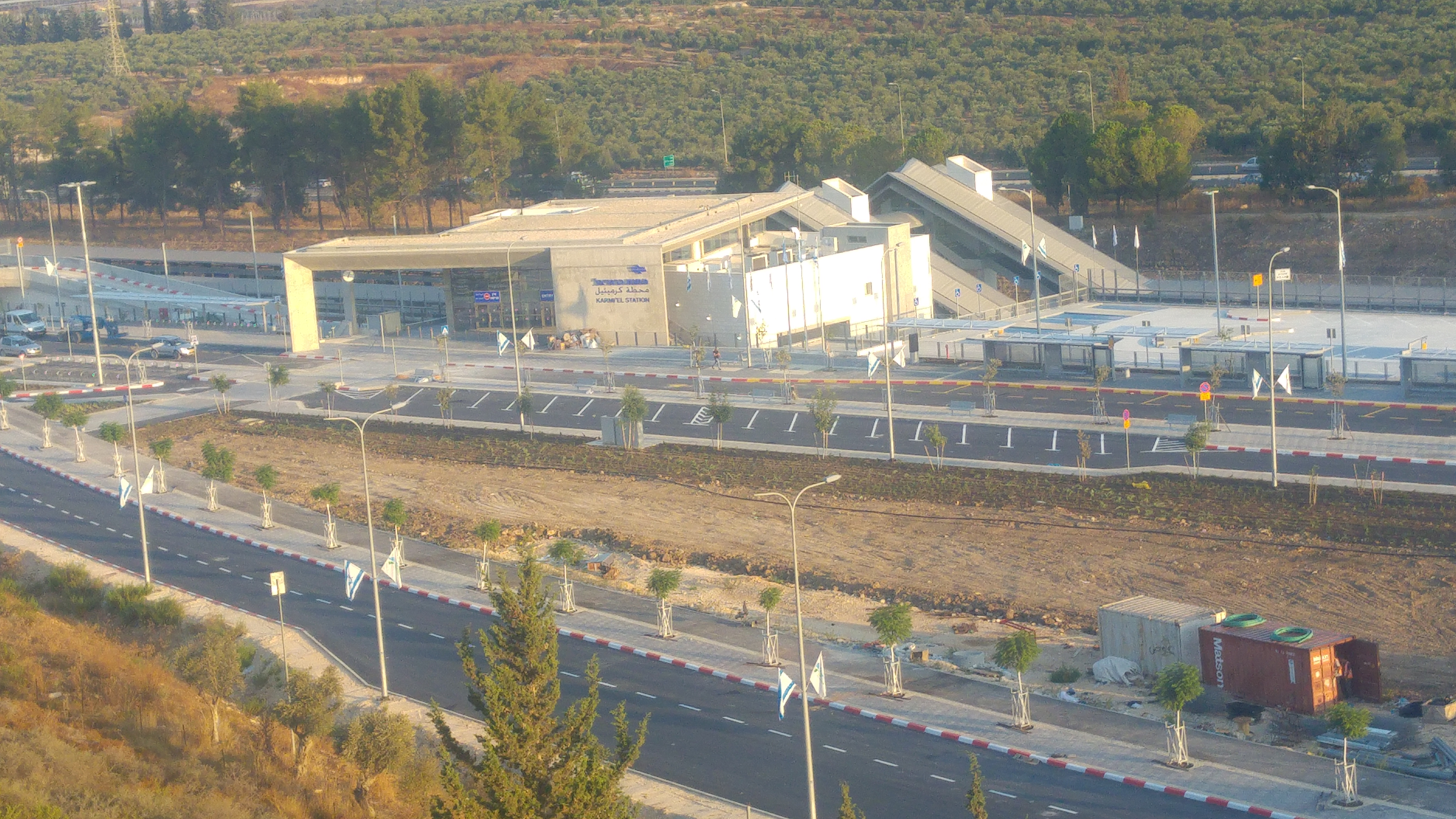 תחנת הרכבת כרמיאל ספטמבר 2017